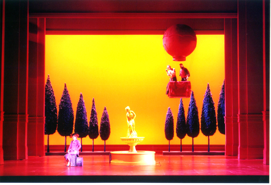 דון ג'ובאני, במאי: מיכה לבינסון, תפאורה: רוני תורן, תלבושות: בוקי שיף, תאורה: אבי - יונה בואנו. האופרה הישראלית, 2000. צילום: גדי דגון